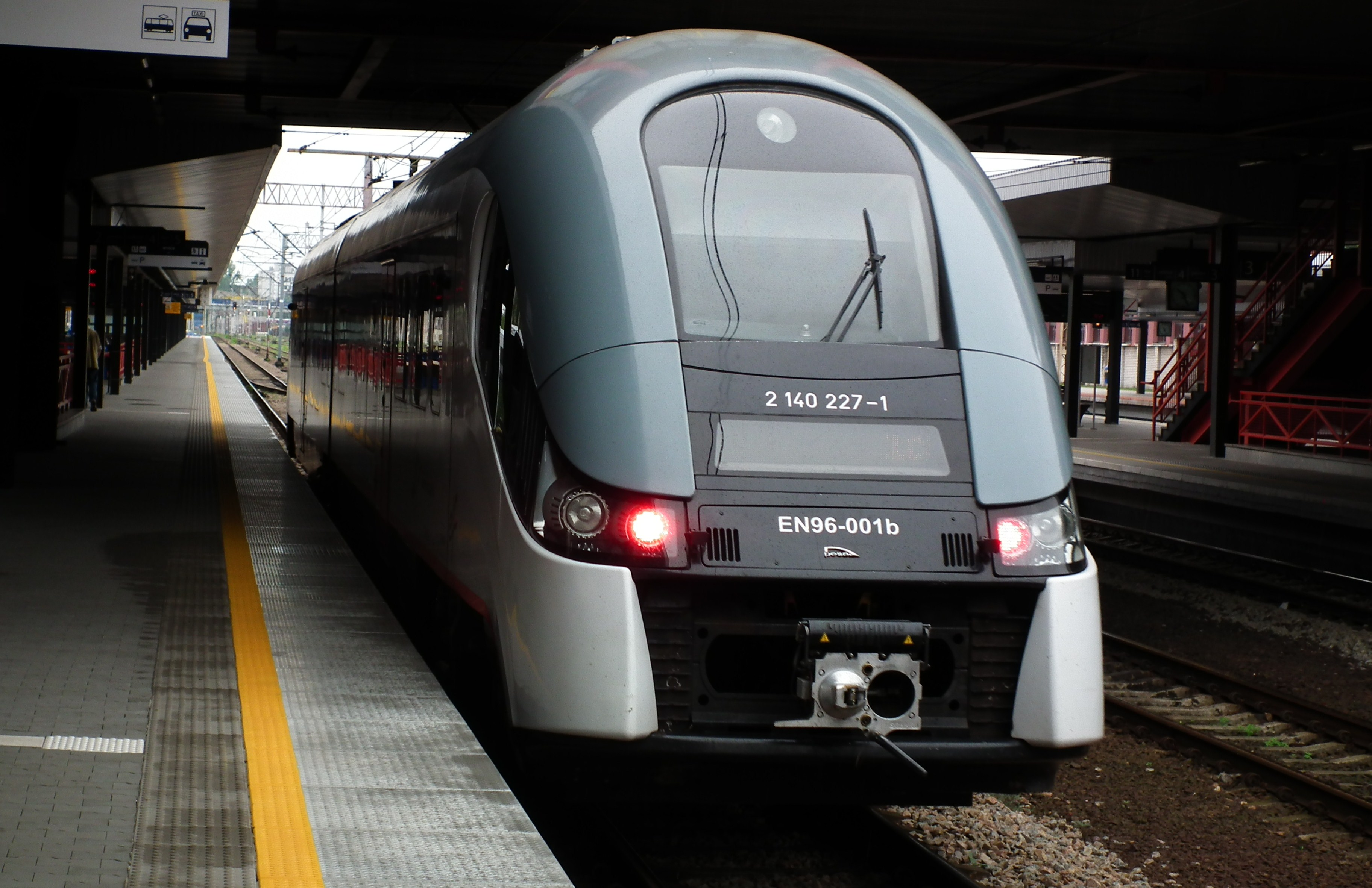 Częstochowa. EN96-001.